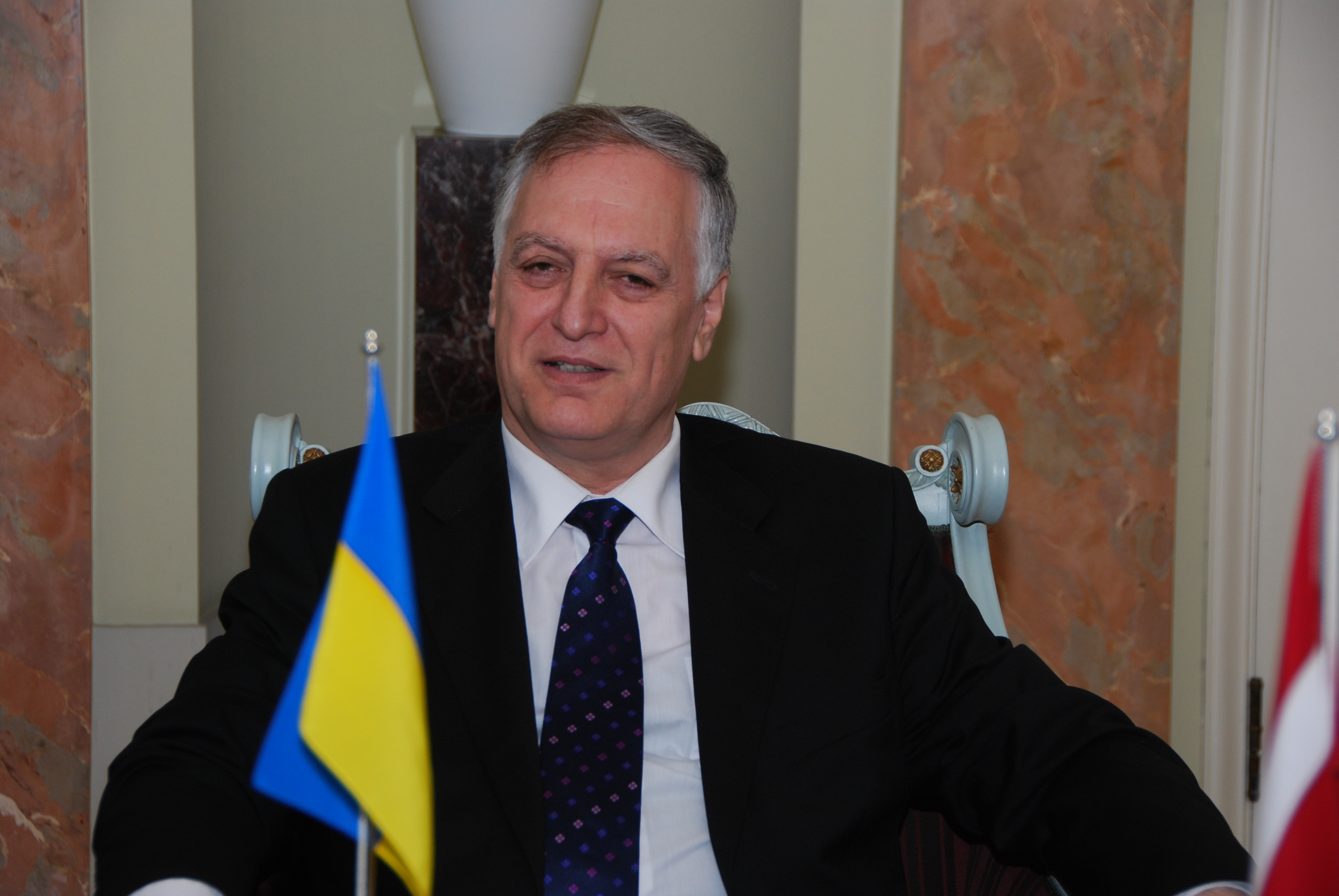 Ukrainas vēstnieks Latvijā Rauls Čilačava Foto: Aivis Freidenfelds, Valsts kanceleja